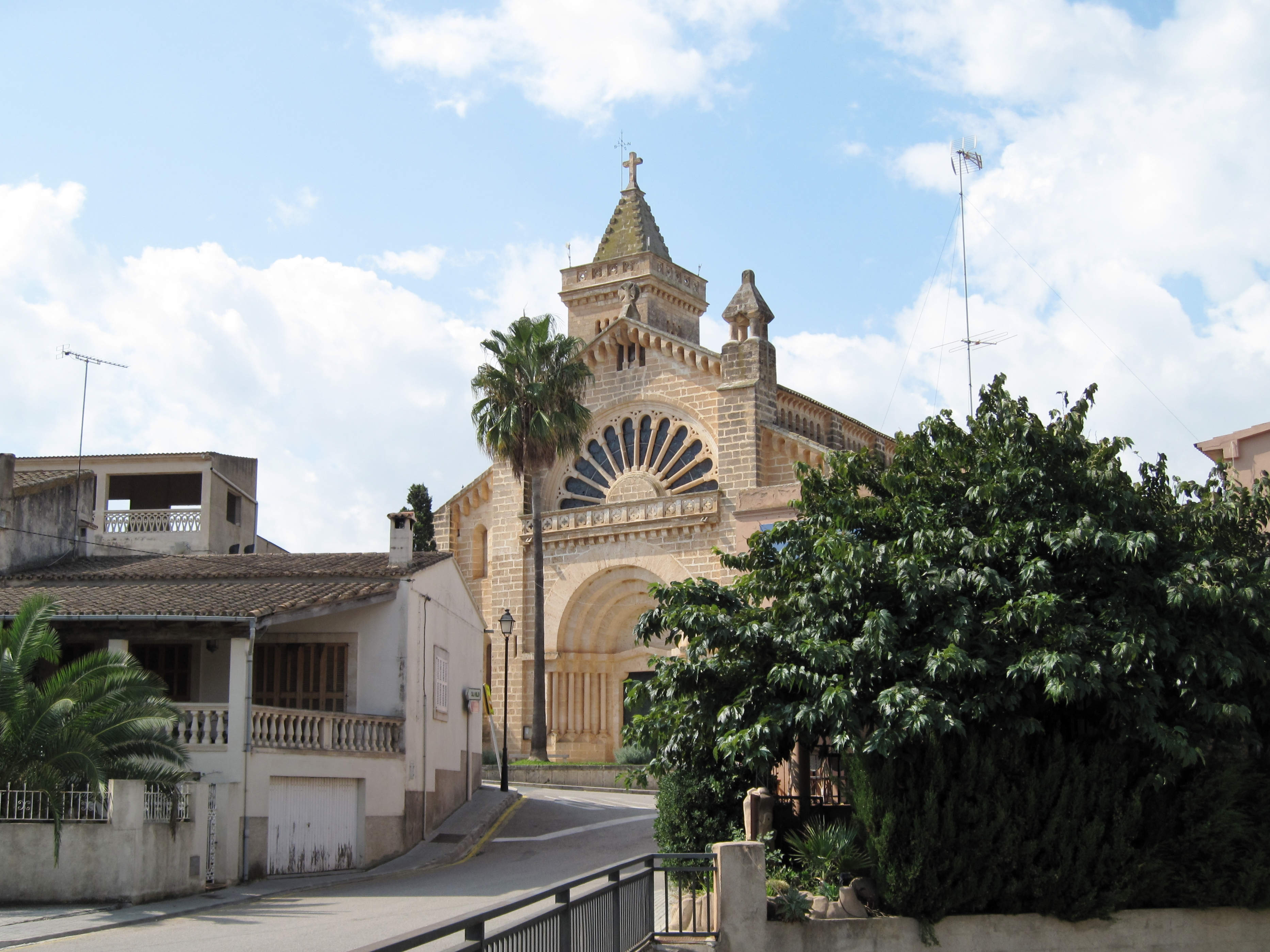 Kirche Sant Miquel in Son Carrió, Mallorca, Spanien